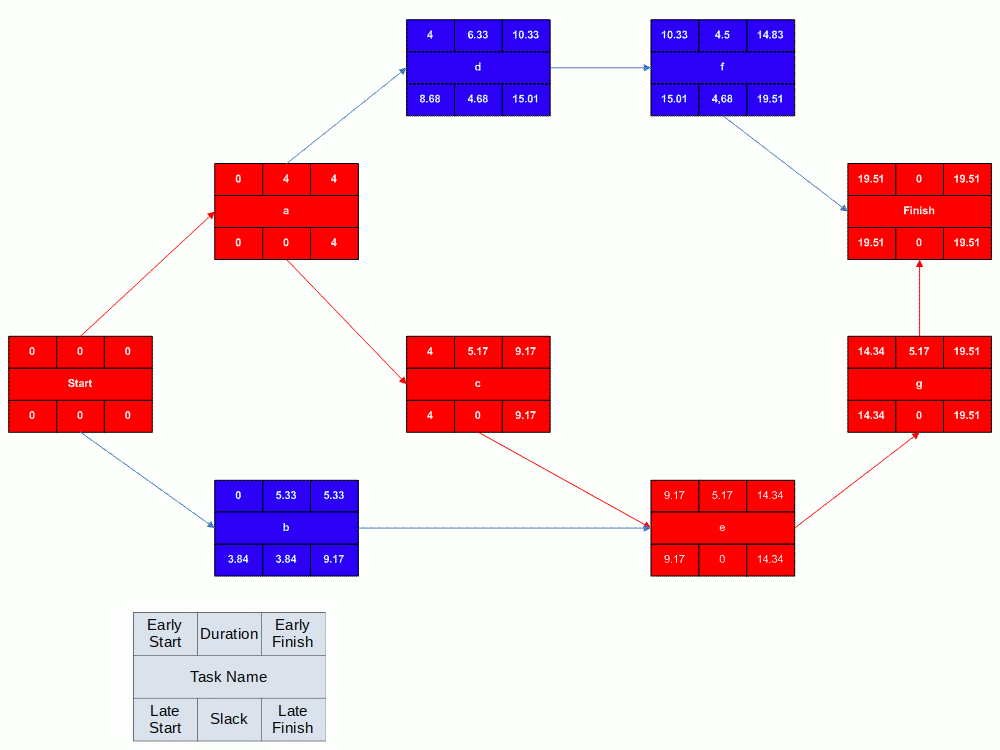 Pert diagram nakreslený v Microsoft Visio